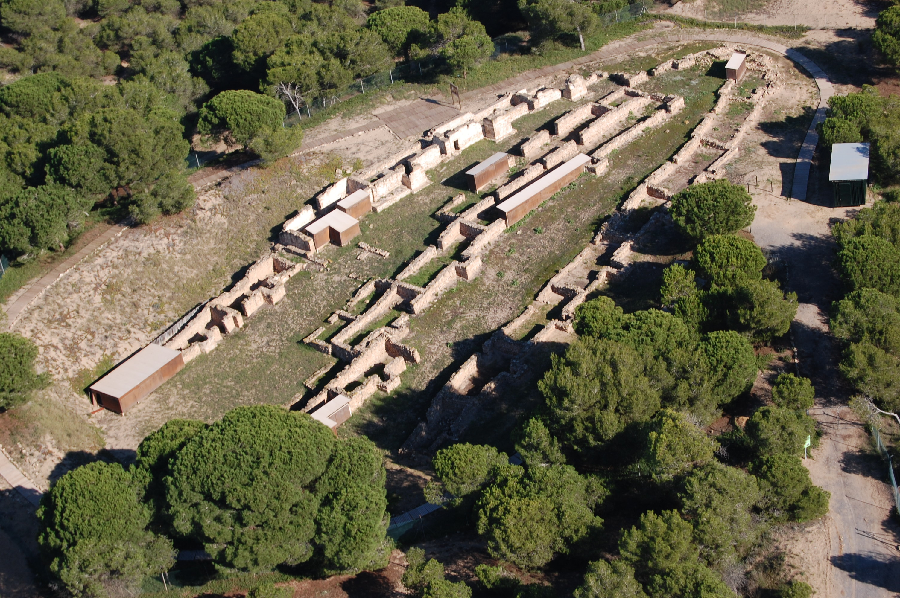 Rábita Califal Guardamar del Segura